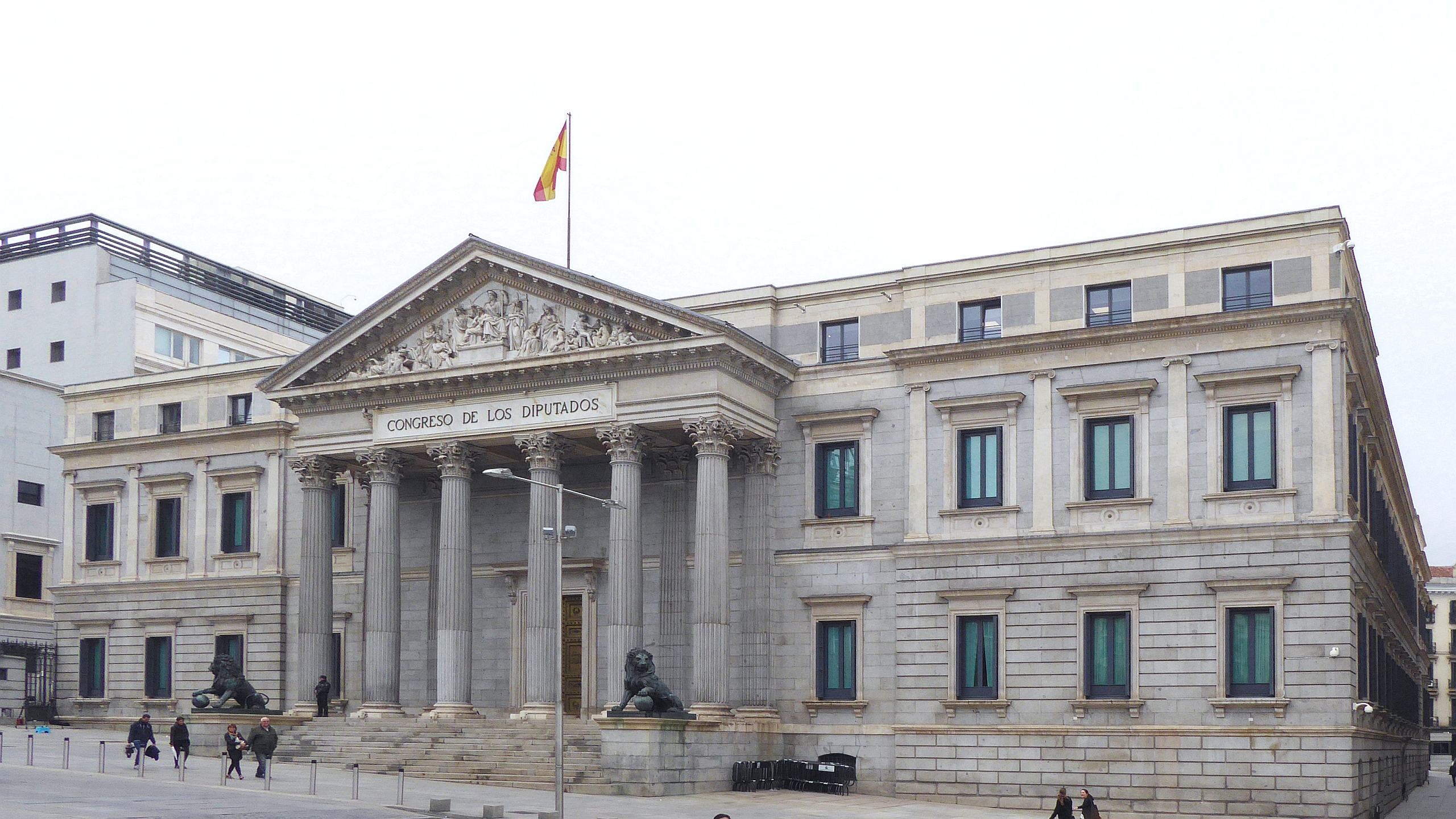 Congreso de los Diputados (1850) heute Palacio de las Cortes span Parlament Madrid España - Foto Wolfgang Pehlemann P1250289